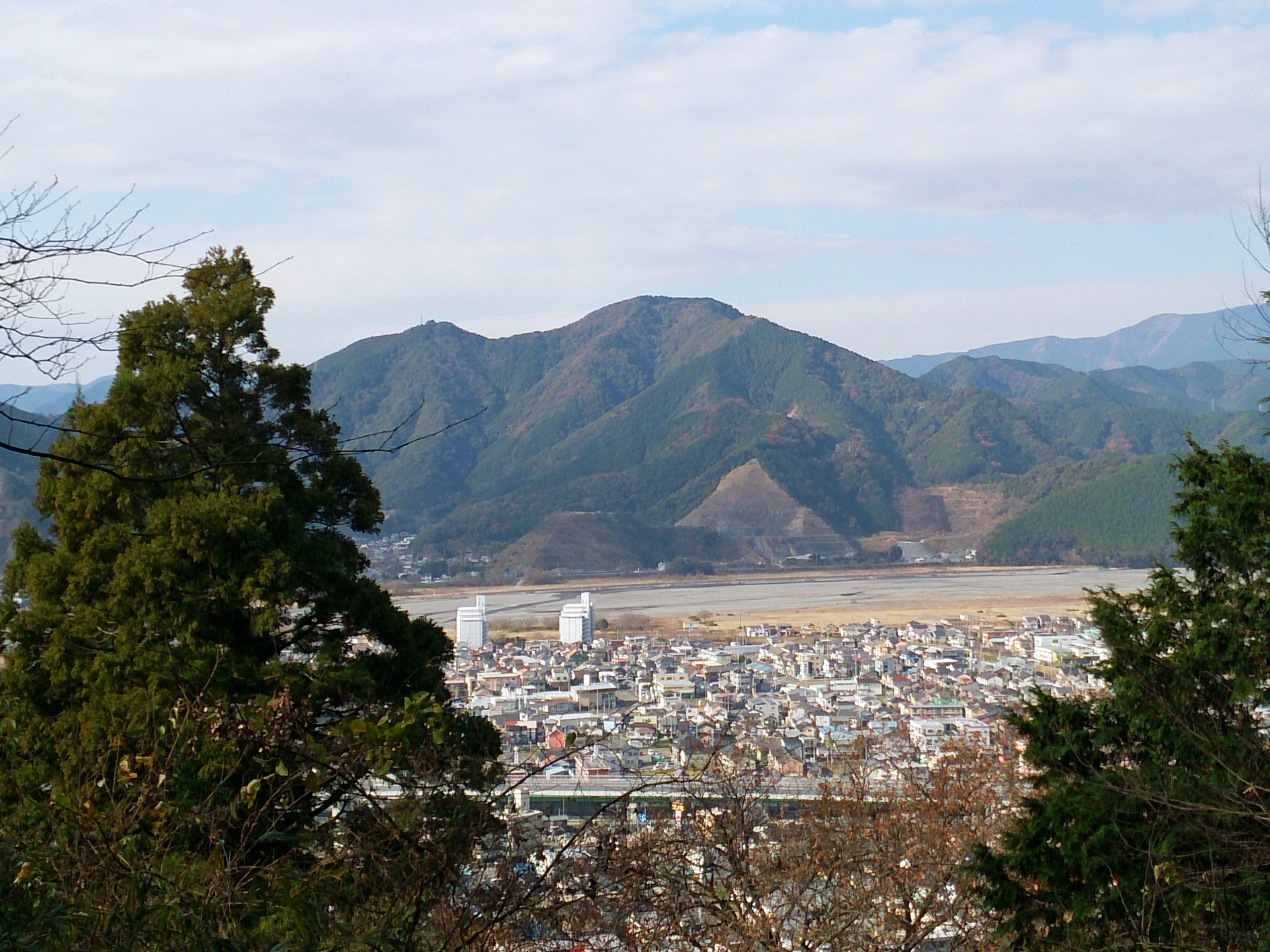 賤機山より見た安倍城跡（2015年12月31日撮影）